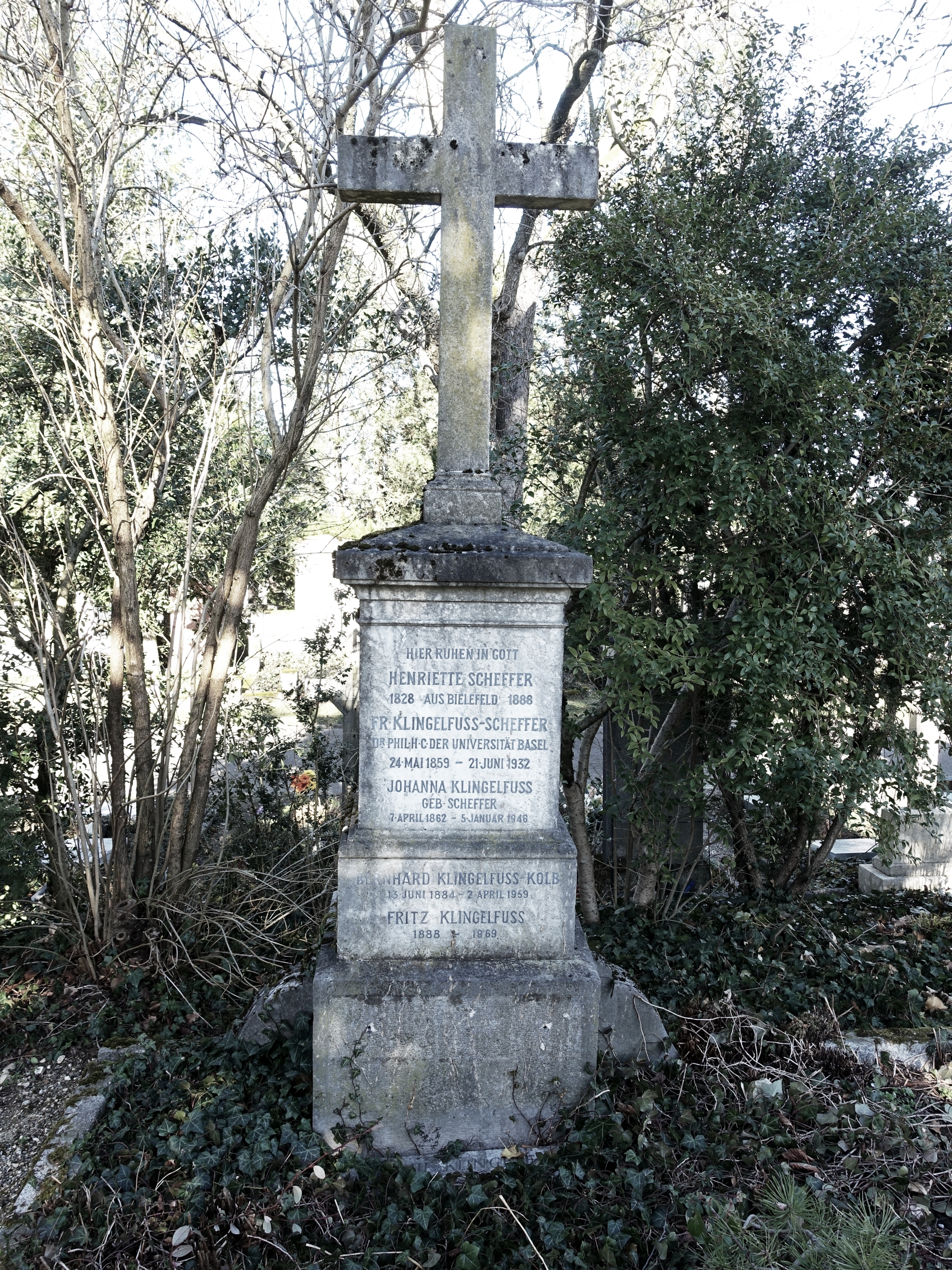 Friedrich Klingelfuss-Scheffer (1859–1932) Dr.phil.an der Uni Basel, Erfinder u.a Funkeninduktoren für Röntgenstrahlen, Familien Grab auf dem Friedhof Wolfgottesacker, Basel